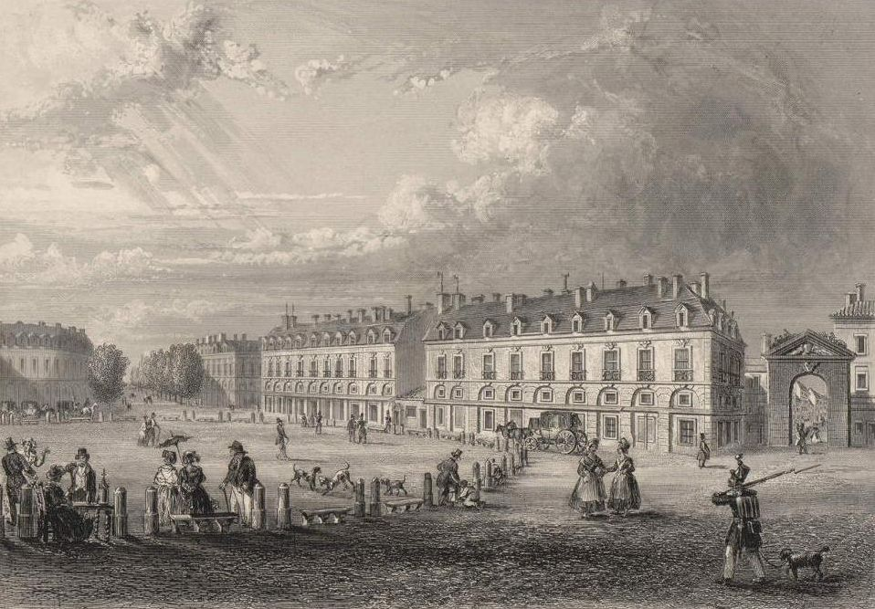 fichier numérisé par la bibliothèque de Bordeaux ; projet SILENE